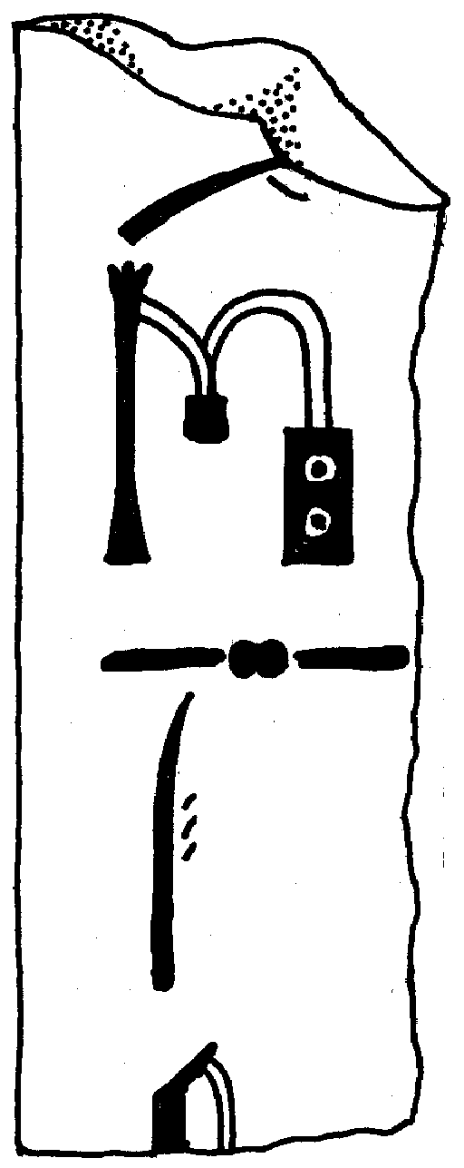 dameged bone-cylinder with the titles and name of the vizir Hesy (ink)